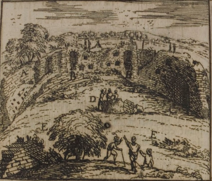 Odéon antique de Lyon. Dessin des ruines publié en page 44 par Jacob Spon dans son ouvrage Recherche des antiquités et curiosités de la Ville de Lyon, ancienne colonie des Romains et capitale de la Gaule celtique, imprimé à Lyon en 1673 Légende de J. Spon : A : tour du théâtre où logeait le peuple B : niches pour se loger ou s'asseoir, fonds de galeries et des montées C : voute de la cavea, prison des bêtes qu'on allait combattre D : Orchestre E arènes où se faisaient les combats et les jeux